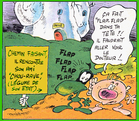 54ème image de « Une araignée dans le plafond » du Concombre masqué